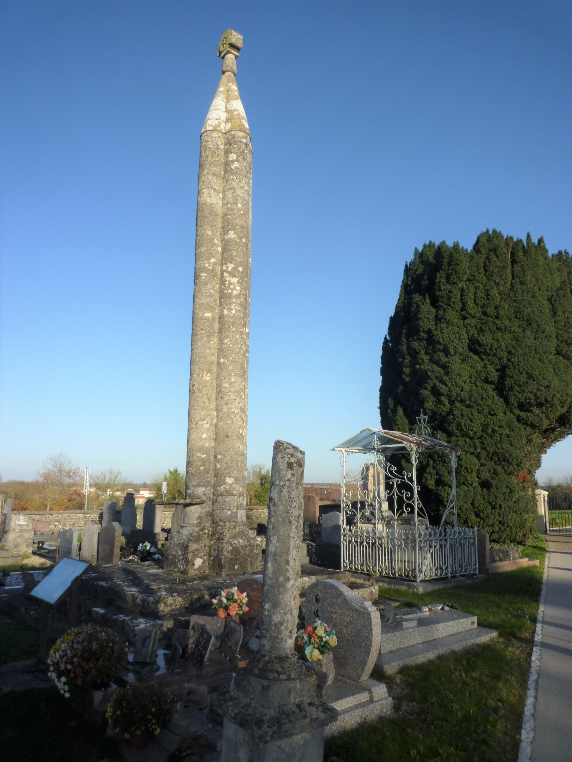 Croix hosanniere du cimetière d'Aiffres